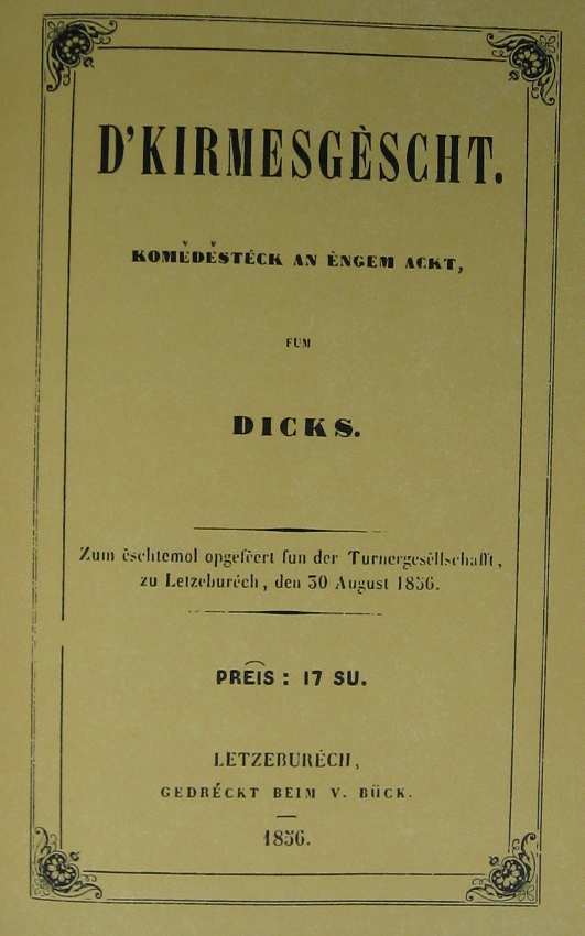 Titelblat vum Dicks (1823-1891) sengem Kaméidistéck D'Kirmesgèscht. Gedréckt beim V. Bück 1856.